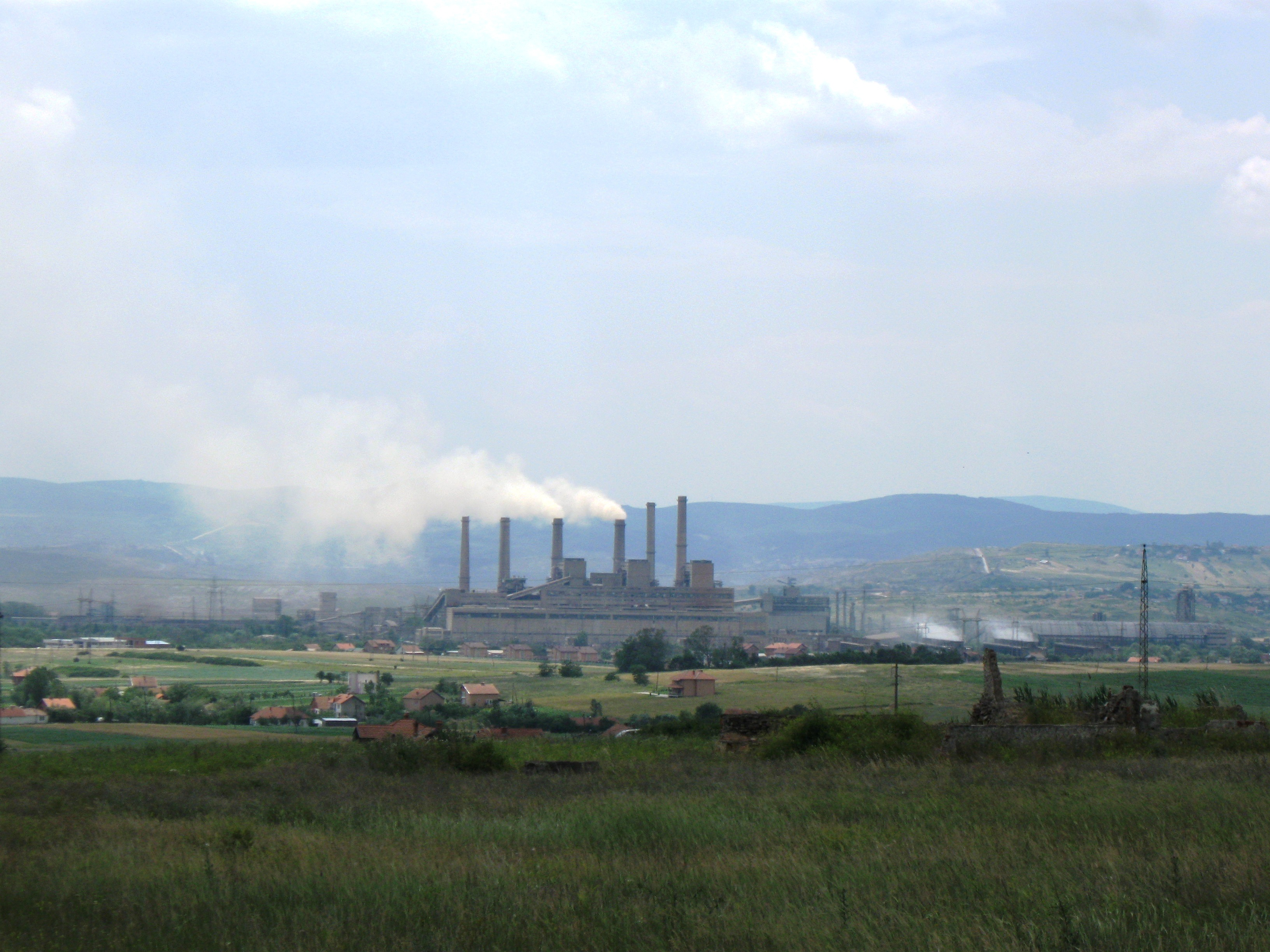 слободна употреба, снимак Радосава Стојановића